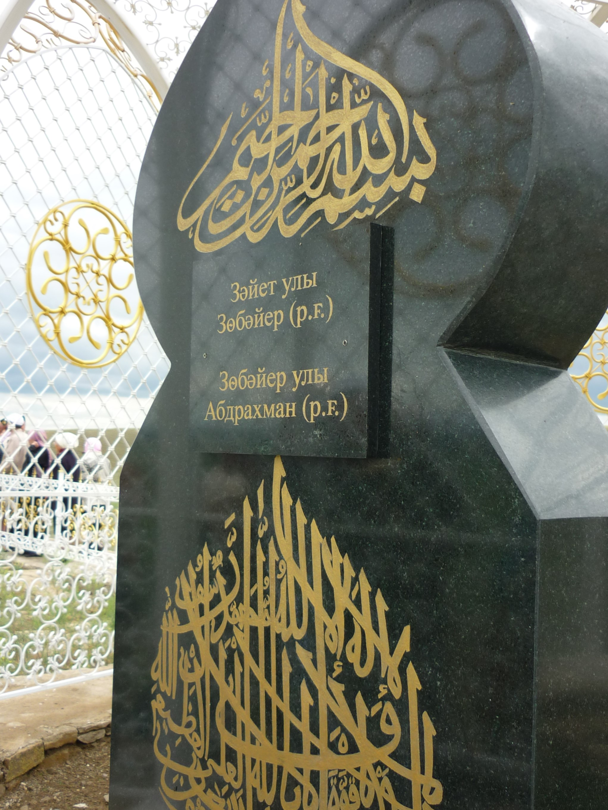 Башҡортса: Башҡортостан Республикаһы.Миәкә районы.